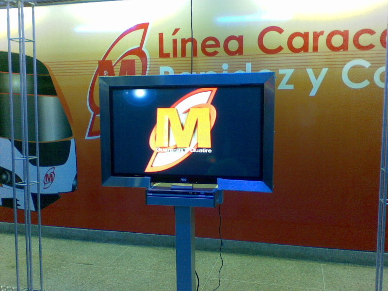 Logo del Metro de Guarenas Guatire en Pantalla, al fondo un tren Modelo.